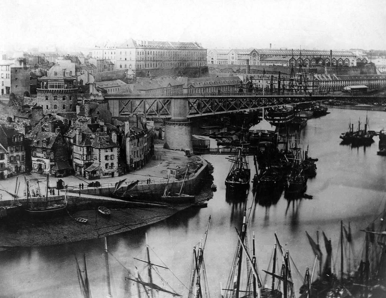 Brest Quai Jean Bart, 1863 archives départementale du finistere - cote 4 Fi 123